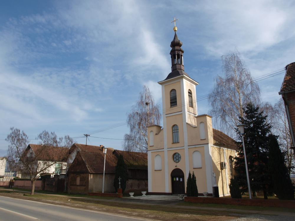 Crkva u Gornjim Andrijevcima, Brodsko-posavska županija.